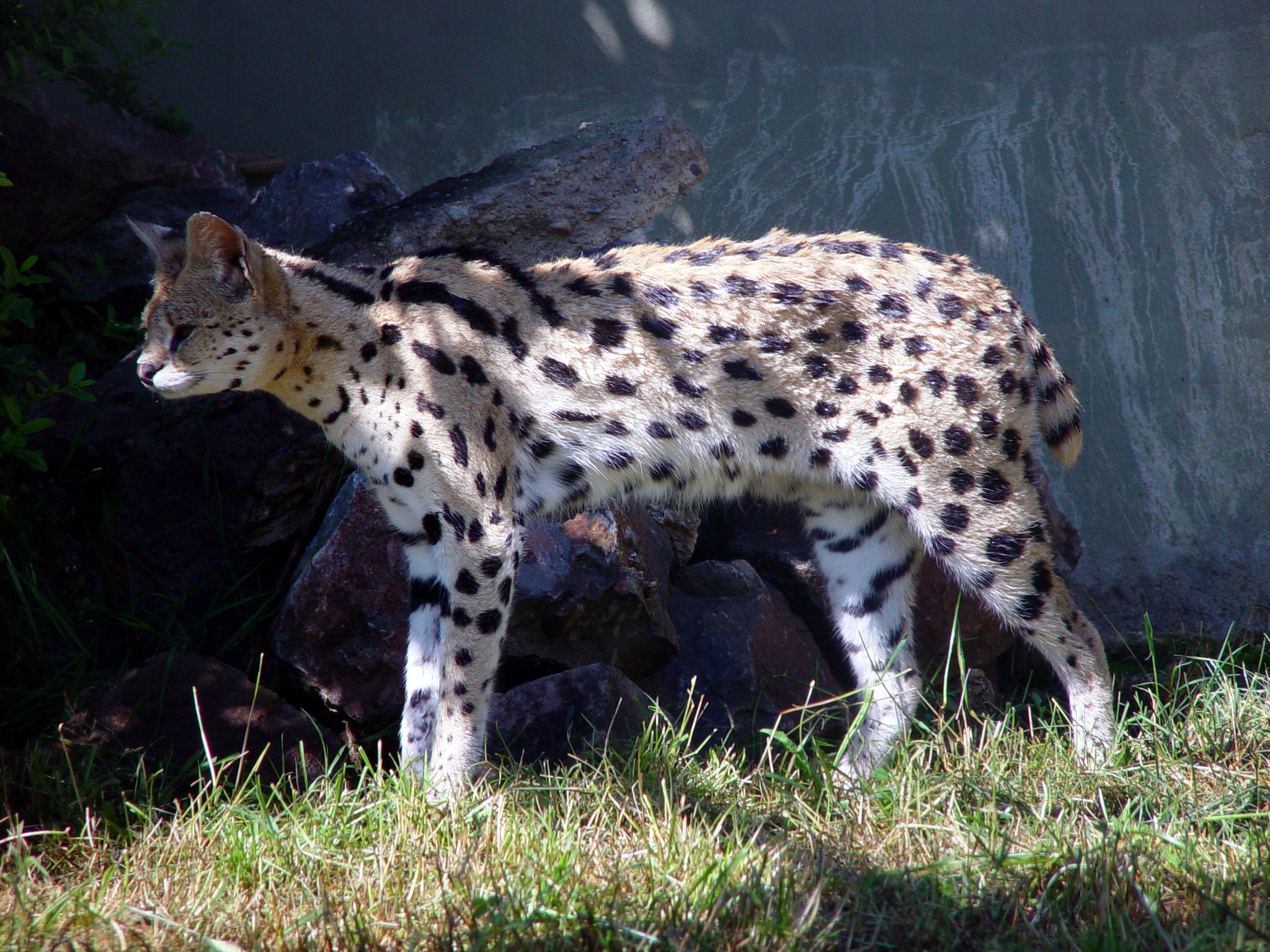 Leptailurus serval, Photos from Istanbul Bogazici Zoo at Darica